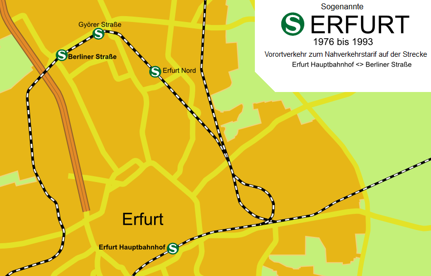 Korrigierte Variante der topografischen Karte des Streckenverlaufs der sogenannten S-Bahn Erfurt, eines Vorortverkehrs zum Nahverkehrstarif. Zwischen 1976 und 1993 verkehrten die Züge in der Hauptverkehrszeit zwischen Erfurt Hbf und dem Haltepunkt Berliner Straße zwecks Anbindung der örtlichen Großwohnsiedlung.